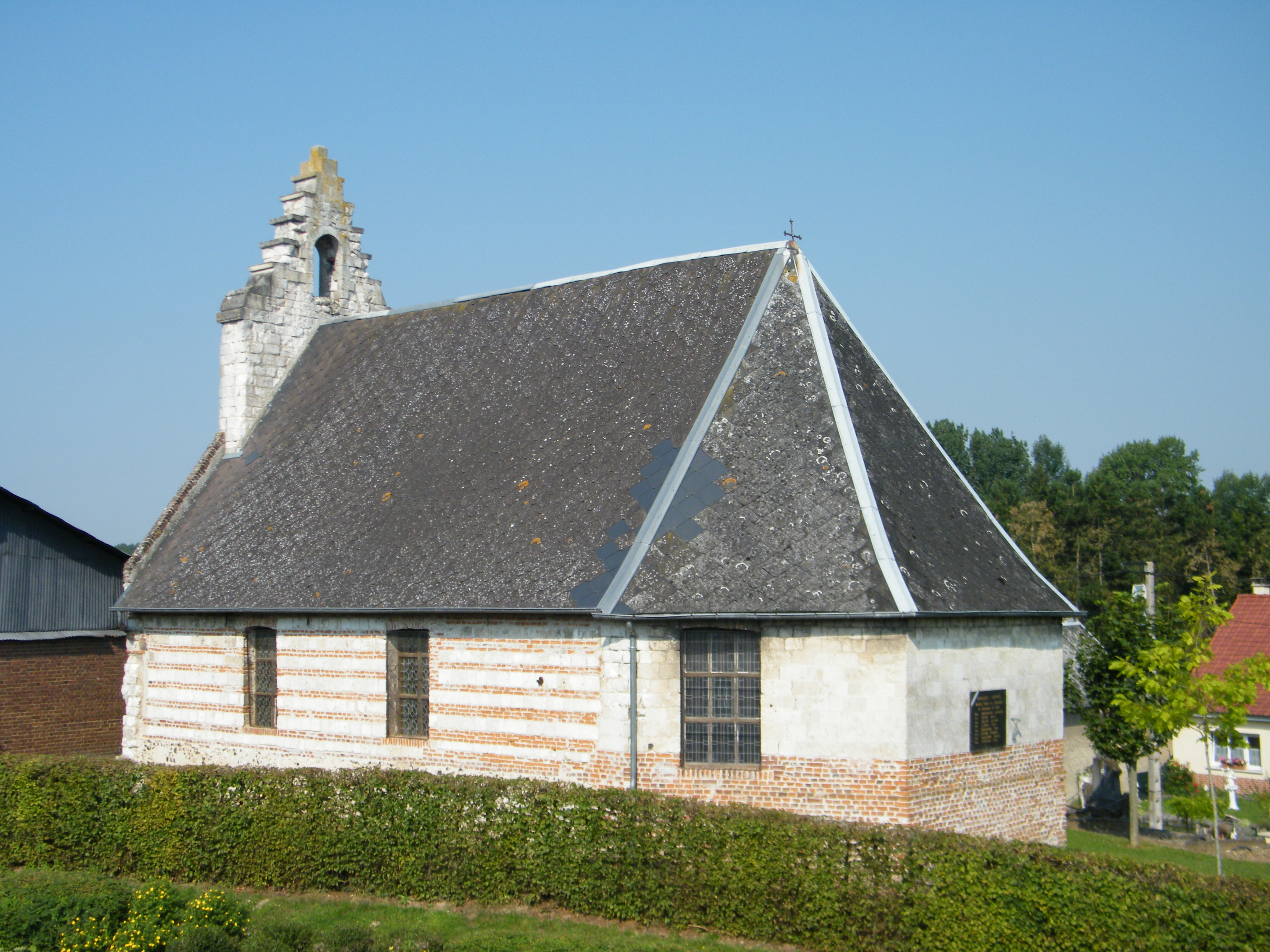 Église saint-Brice, désacralisée en 2008, futur espace culturel.